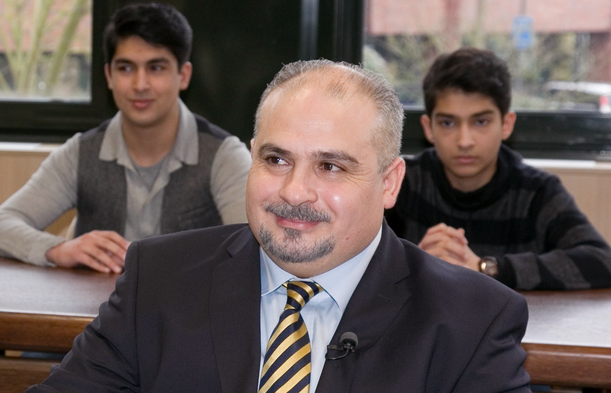 H.E. Sultan Masood Dakik bei der Verleihung des Bundesverdienstkreuzes.